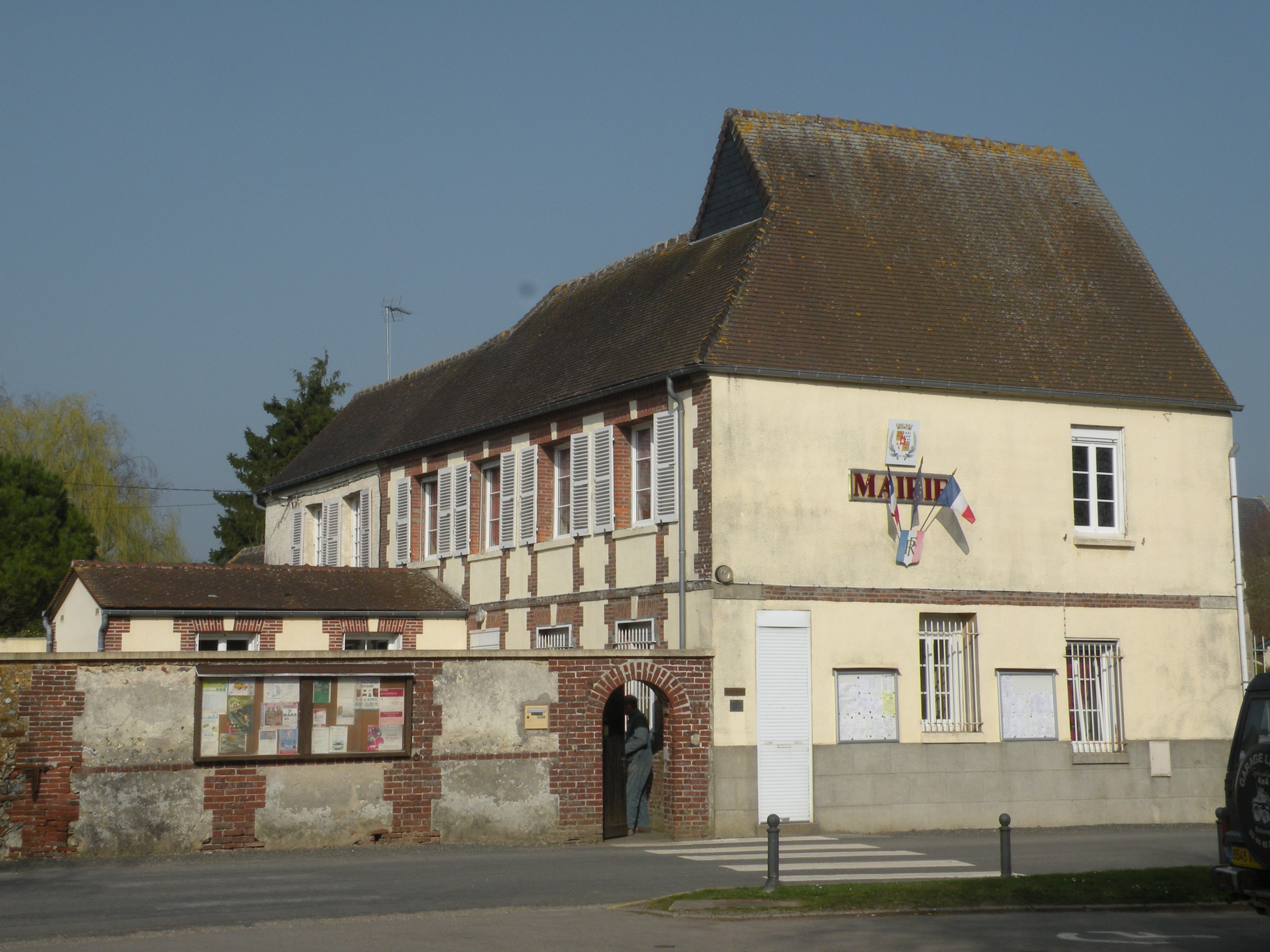 Jouy-sous-Thelle